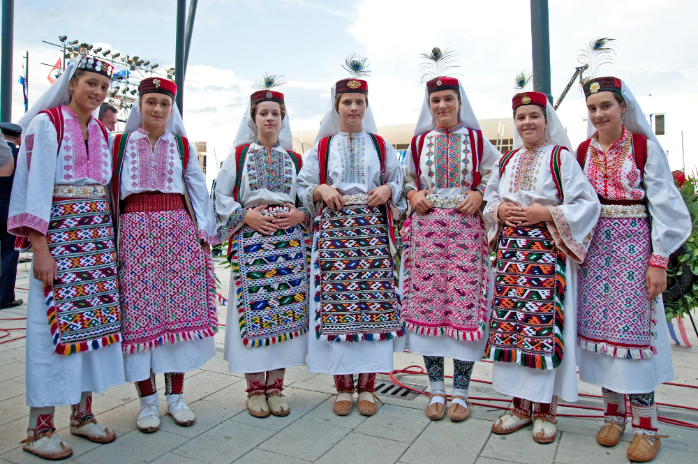 Vrlička narodna nošnja. Žensku narodnu nošnju kao i mušku odlikuje višeslojno oblačenje jednog predmeta preko drugoga, iako je košulja prvi i osnovni, vidljivi dio nošnje, zabilježena je i često se na fotografijama ispod nje nazire vrsta jednostavne potkošulje koja se nazivala komeš. "Tunica dalmatica" u ljetnom razdoblju, posebno pri žetvenim radovima, zna biti upotpunjena samo pregačom i pojasom, tkanicom ili pasom koji je pridržava, ali u neuobičajenom položaju: zavrnuta i zataknuta za pojas i obješena straga.